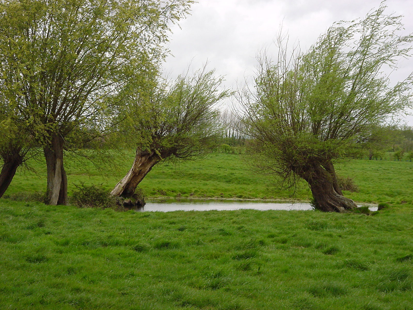 Mare entourée de saule ; l'une des rares qui n'aient pas été détruites dans ce secteur, ici entre le Mont Cassel et le village d'Ebblinghem, dans le département du Nord, au nord de la France; Cette mare et ses saules tétards (trognes) sont un refuge pour de nombreuses espèces menacées dans cette région. (tritons, oiseaux cavicoles, communautés saproxyophages..). Les mares ont reculé avec le développement des remembrements et de l'agriculture intensive dans les années 1970 à 2000 principalement, malgré le fait qu'elles abritaient des espèces protégées par la loi.